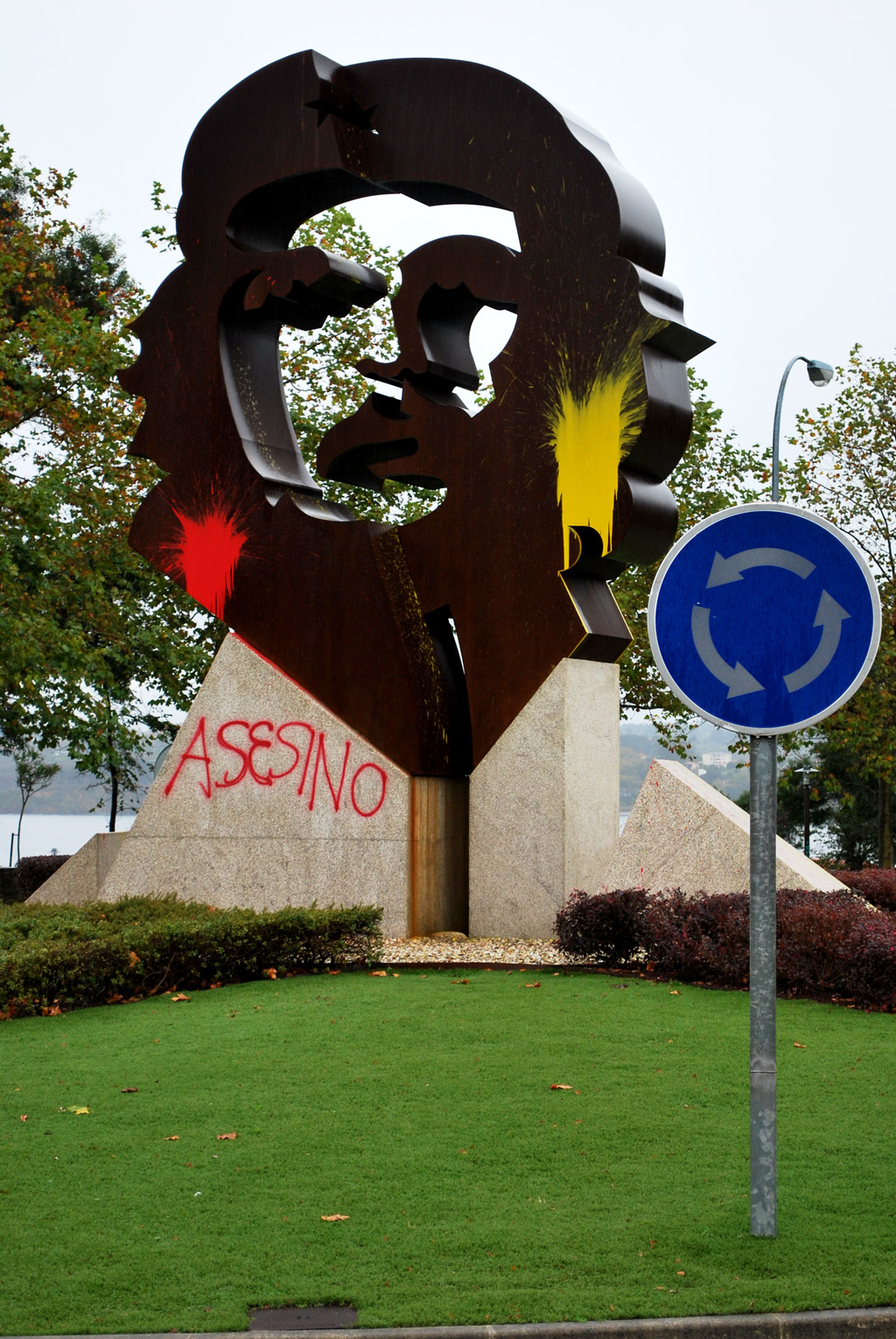 Homenaxe a Che Guevara 48 pasamento.